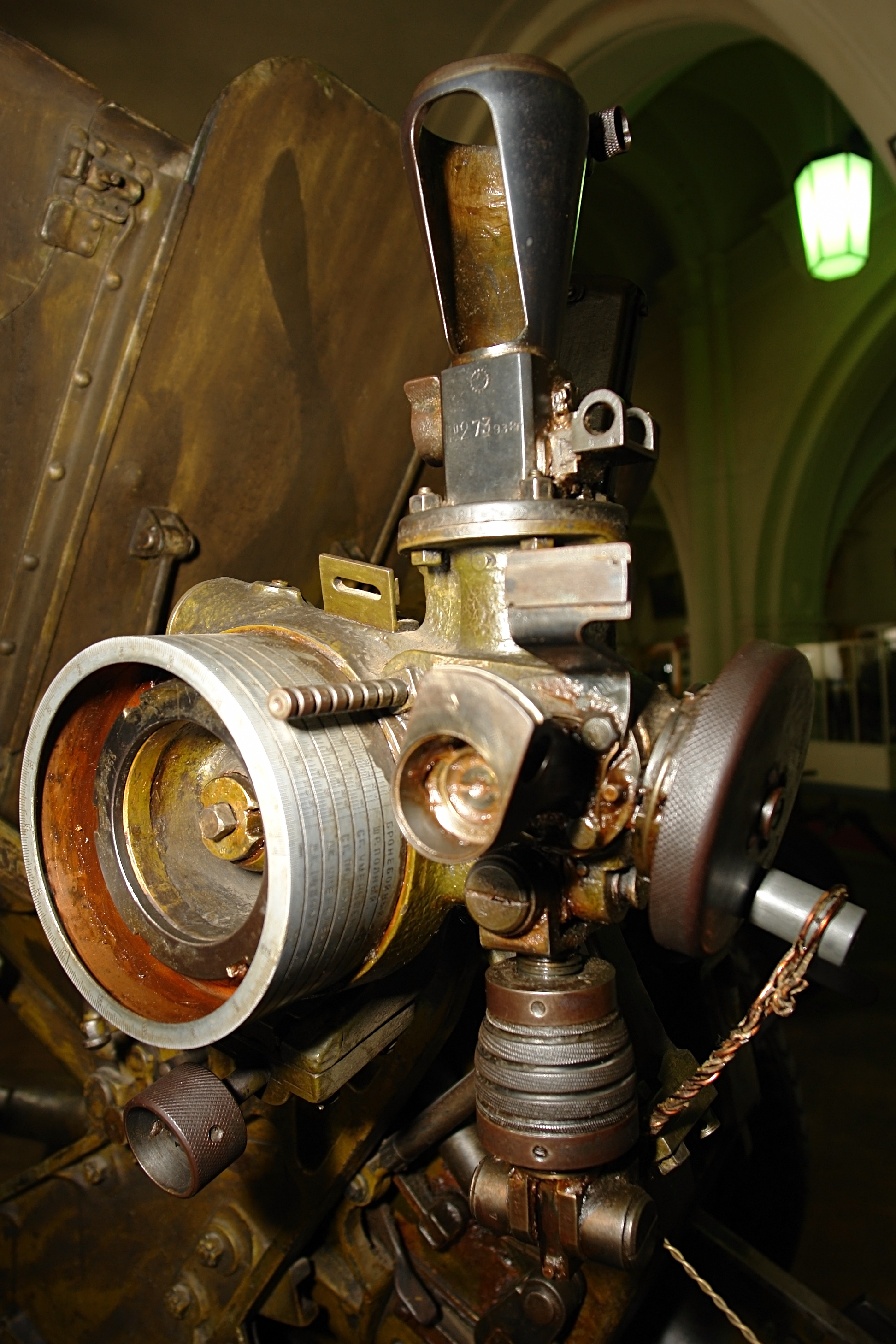 76-мм пушка обр. 1936 г. № 118 Дальность стрельбы— 13700 м. Скорострельность —15—20 выстрелов в минуту. Масса в боевом положении — 1620 кг. Изготовлена в 1939 г. Командир орудия ст. сержант И. В. ПОЛЯКОВ. 18 января 1944 г., в период ожесточенных боев при снятии блокады Ленинграда, с Пулковских высот орудие старшего сержанта И. В. Полякова, приданное танковому подразделению, используя прорыв обороны противника, было выдвинуто вместе с танками в глубь его обороны. Заняв огневую позицию, артиллерийский расчет мужественно отбивал атаки врага, уничтожил более взвода фашистов, 10 пулеметных точек, 4 танка. Старший сержант И. В. Поляков лично захватил в плен фашистского офицера и двух солдат. За отвагу и героивм, мужество и доблесть ему было присвоено звание Героя Советского Союза. Военно-исторический музей артиллерии, инженерных войск и войск связи, Санкт-Петербург.